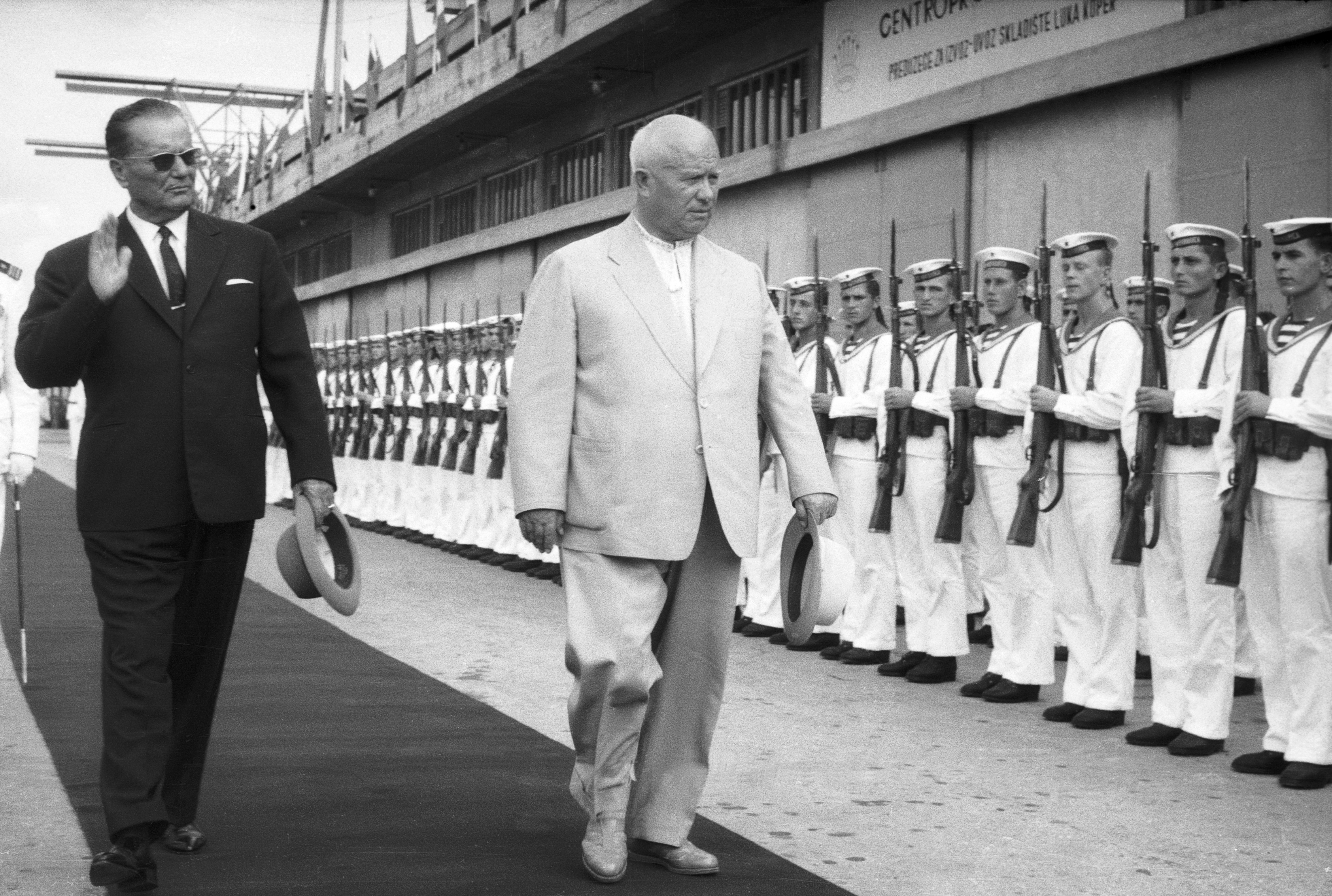 Predsednik Jugoslavije Tito (levo) in sovjetski premier Hruščov v Kopru